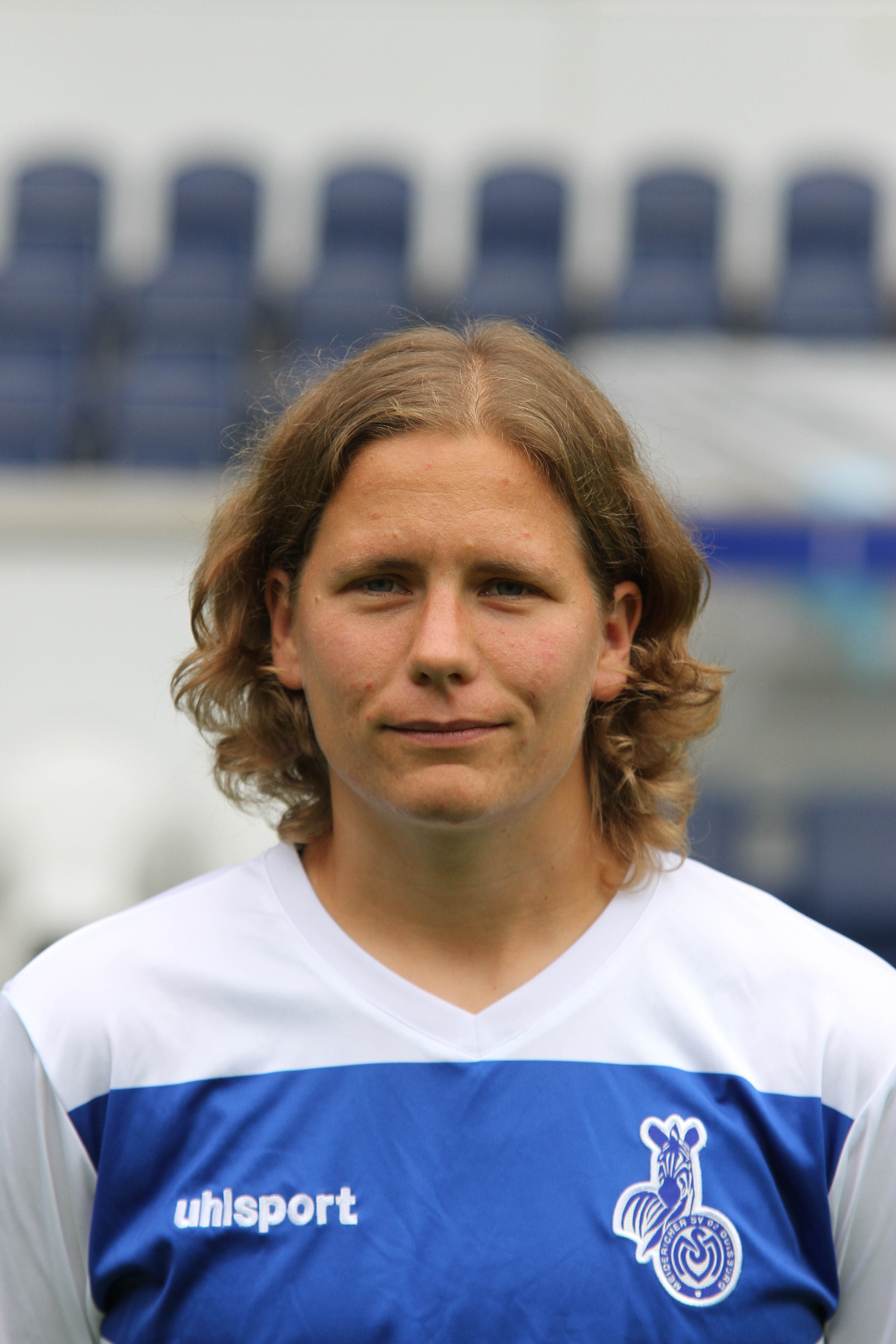 Barbara Müller (2014)